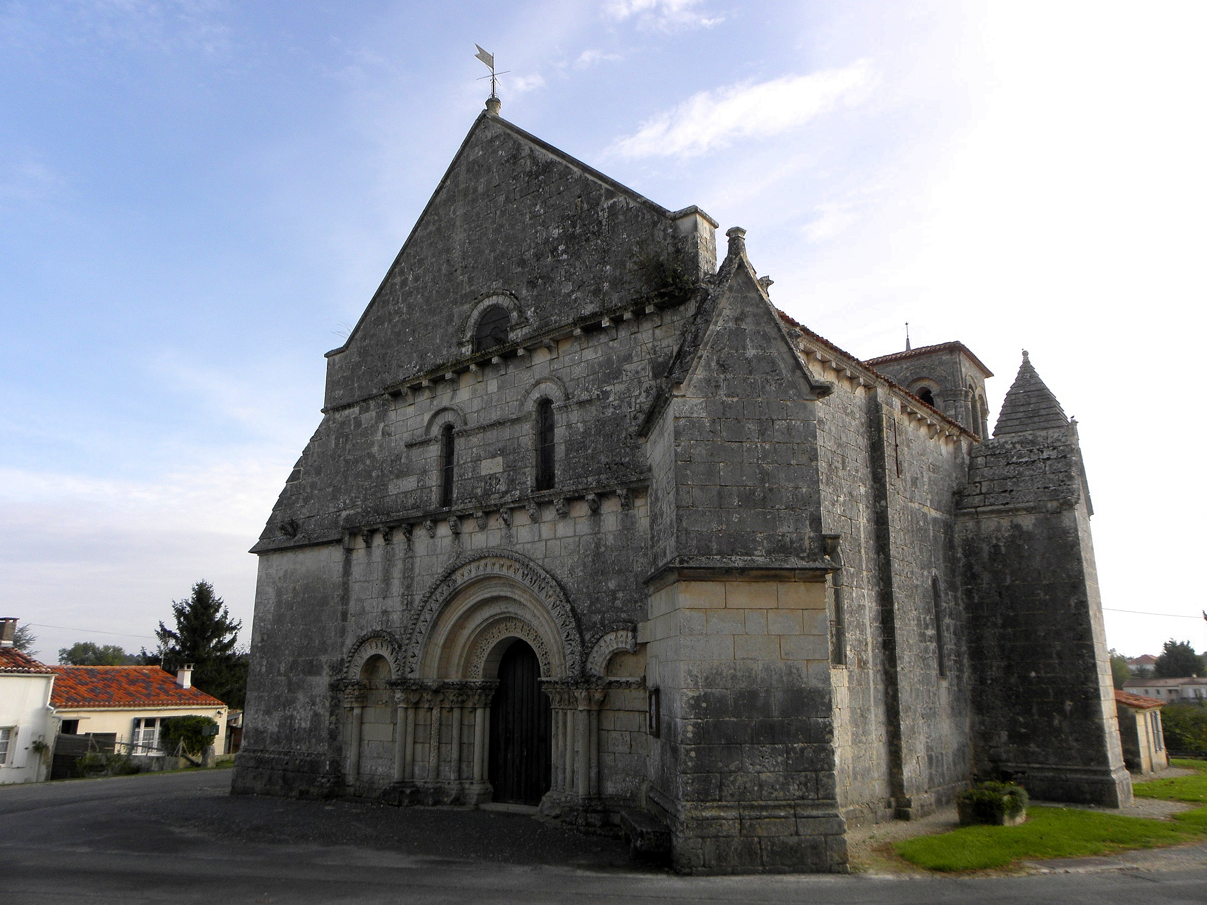 Église Saint-Pierre d'Écurat (17). Façade occidentale.